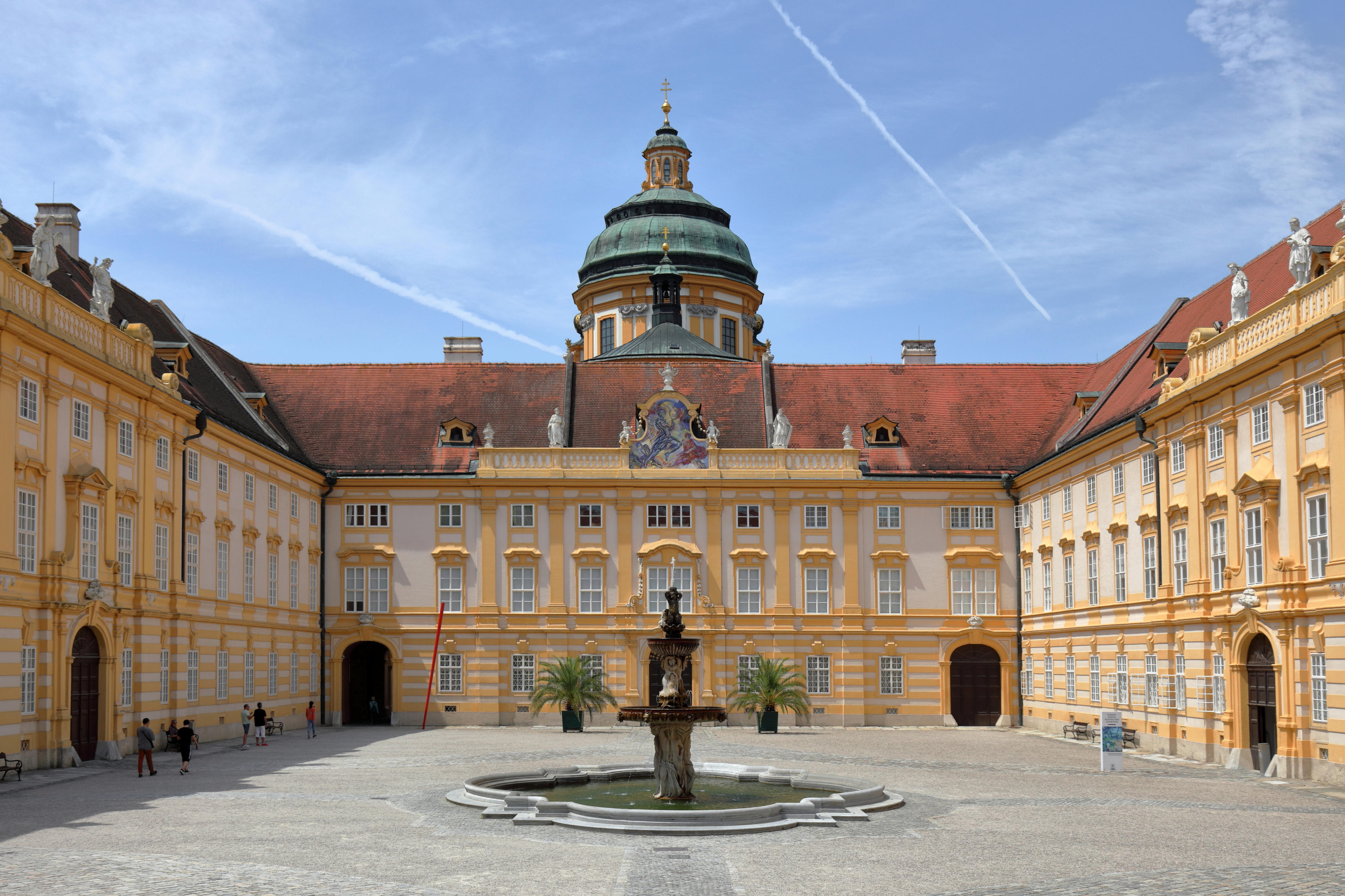 Der Prälatenhof des Benediktinerklosters in der niederösterreichischen Stadtgemeinde Melk. Das Stift in der heutigen Form wurde in den Jahren von 1702 bis 1746 von Jakob Prandtauer errichtet.